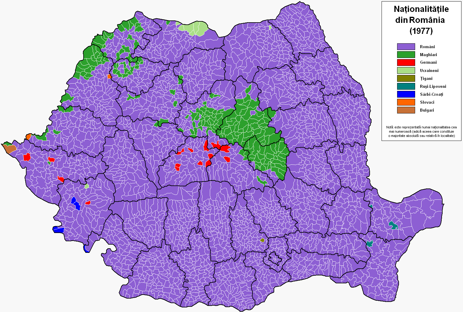 Harta etnica (rec. 1977).